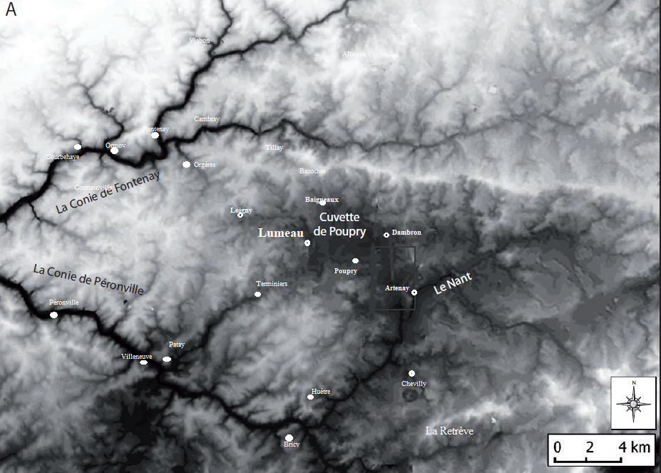 Villages autour de la cuvette de Poupry (Eure-et-Loir, France) sur fond modifié du relief du bassin versant amont de la Conie, niveaux de gris indirectement déterminés d'après données IGN BDAlti R&E (extrait et modifié de la source originale publiée dans figure 6 du rapport de fouille archéologique d'Emilie Fencke et al. Poupry (Centre-28) "Vers Artenay III". Des indices d'occupations pré- et protohistoriques : rapport de fouille archéologique, « Poupry «Vers Artenay III» - Zone d’activités interdépartementale - 28.303.027- Fouille préventive - 2015 ; Conseil départemental d’Eure-et-Loir ».)